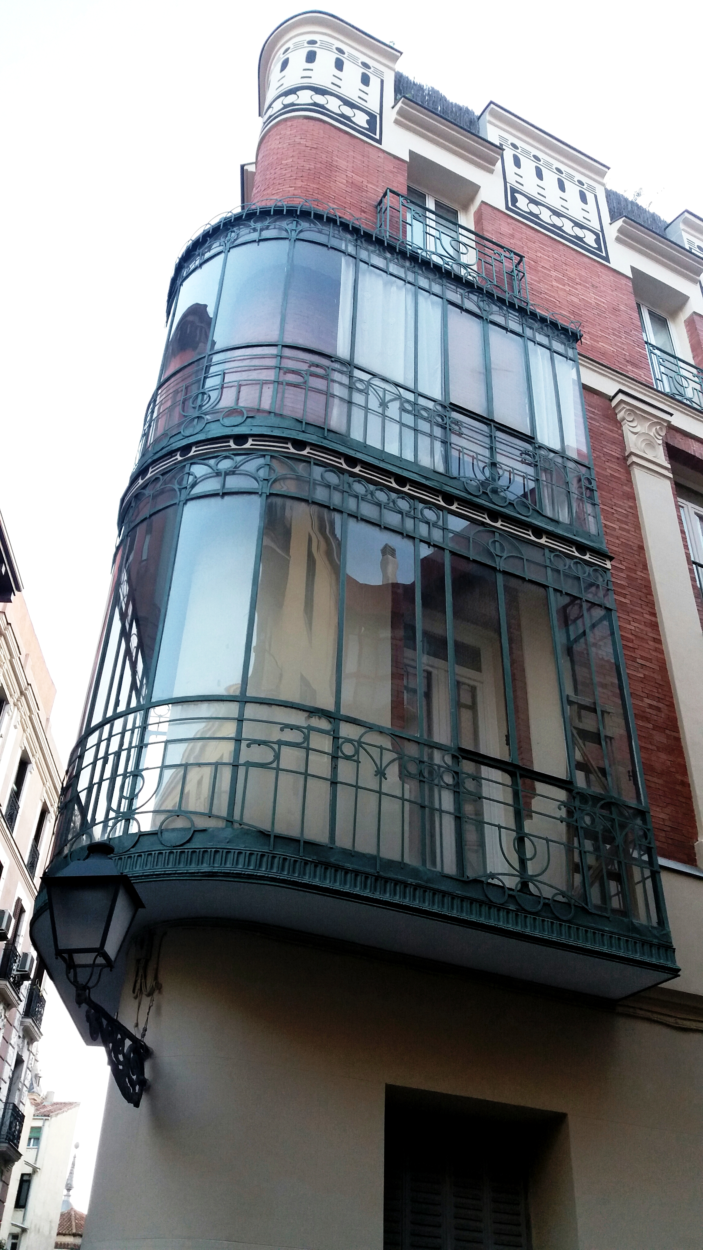 Edificio modernista en la Calle de los Señores de Luzón, número 9, en Madrid (España). Fue construido en 1911 por Eduardo Ferrès i Puig y Manuel Álvarez Naya